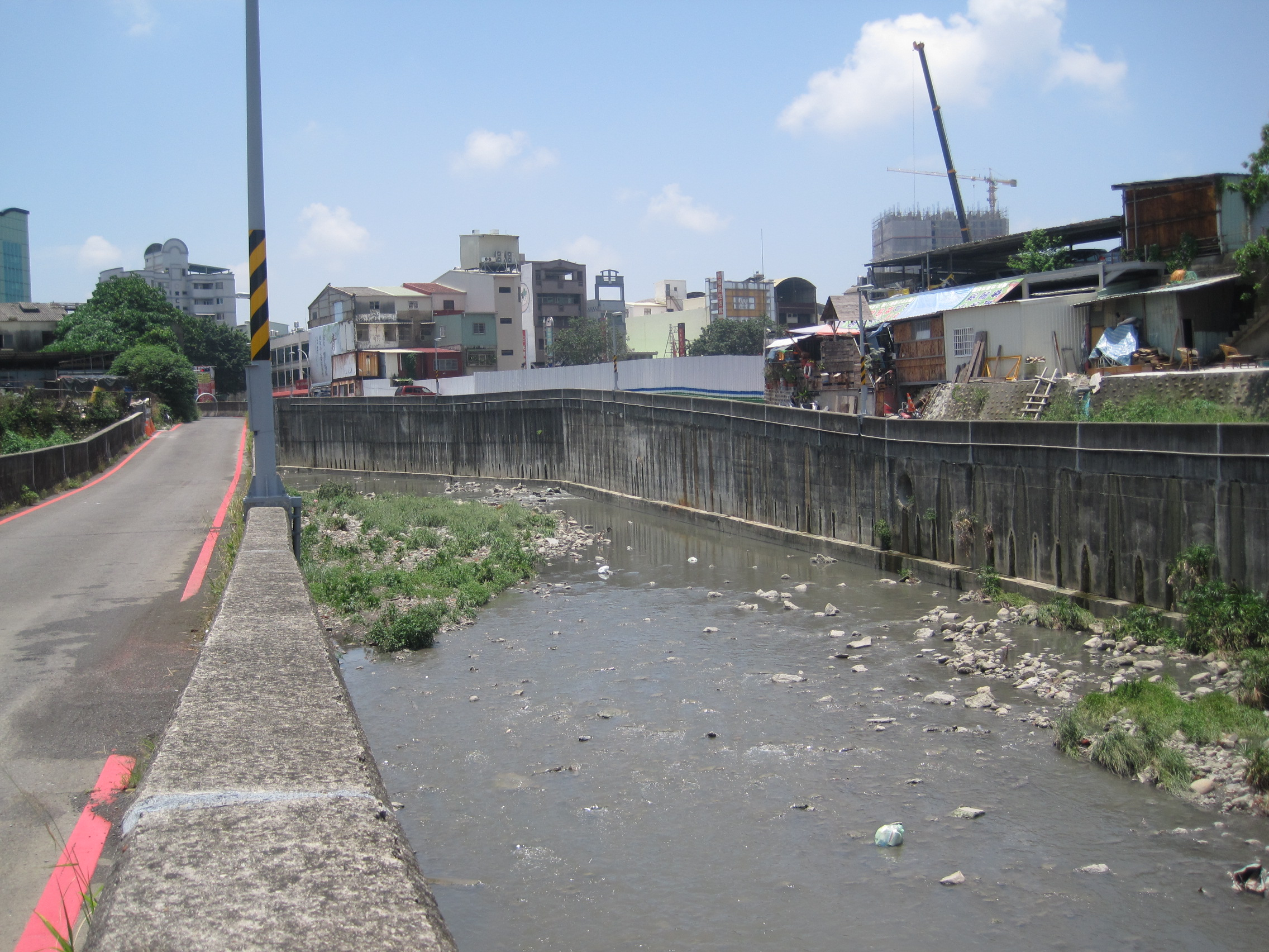 柴頭港溪過了開元橋之後的河段